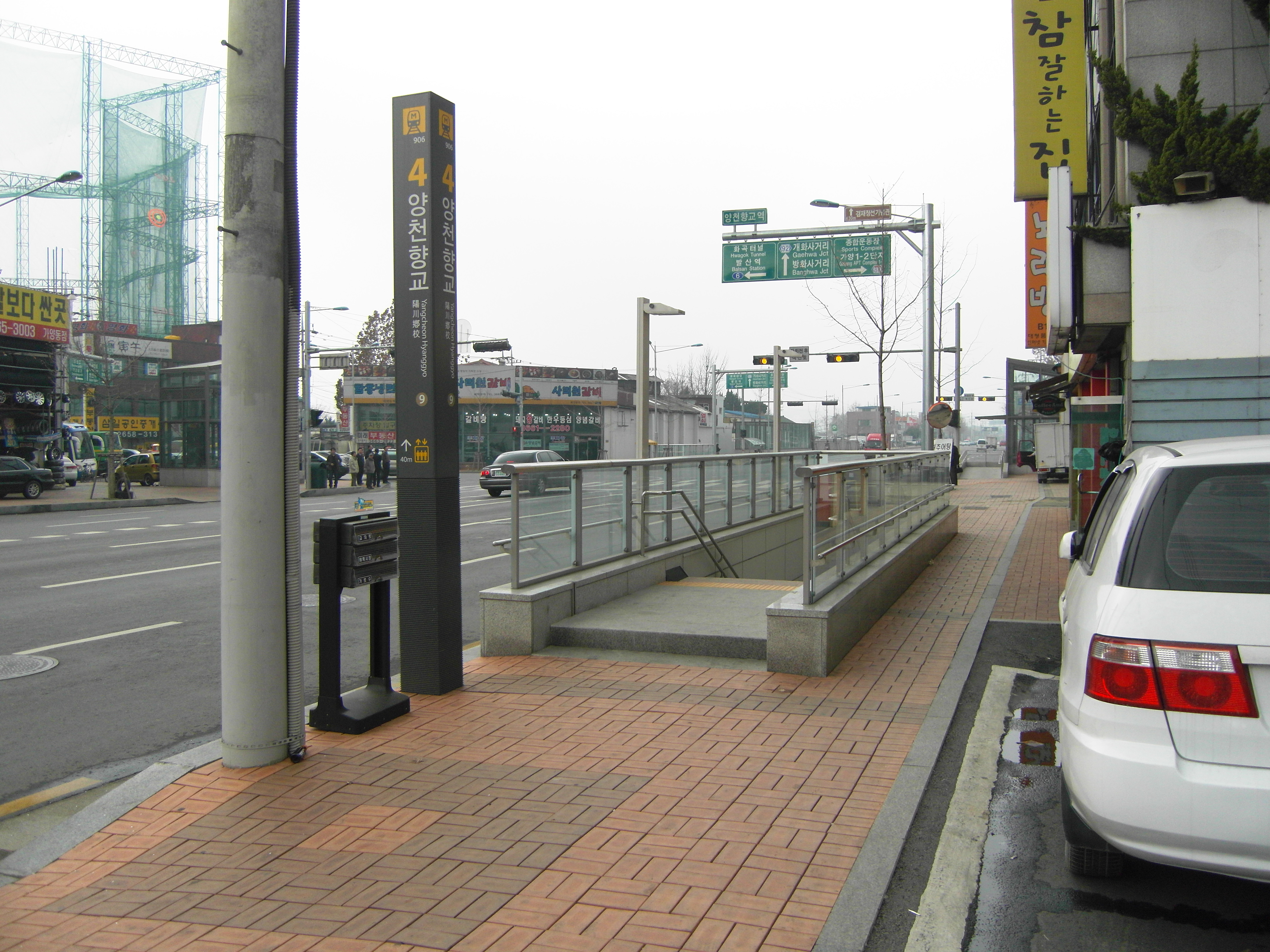 ソウル地下鉄9号線陽川郷校駅 4番出口